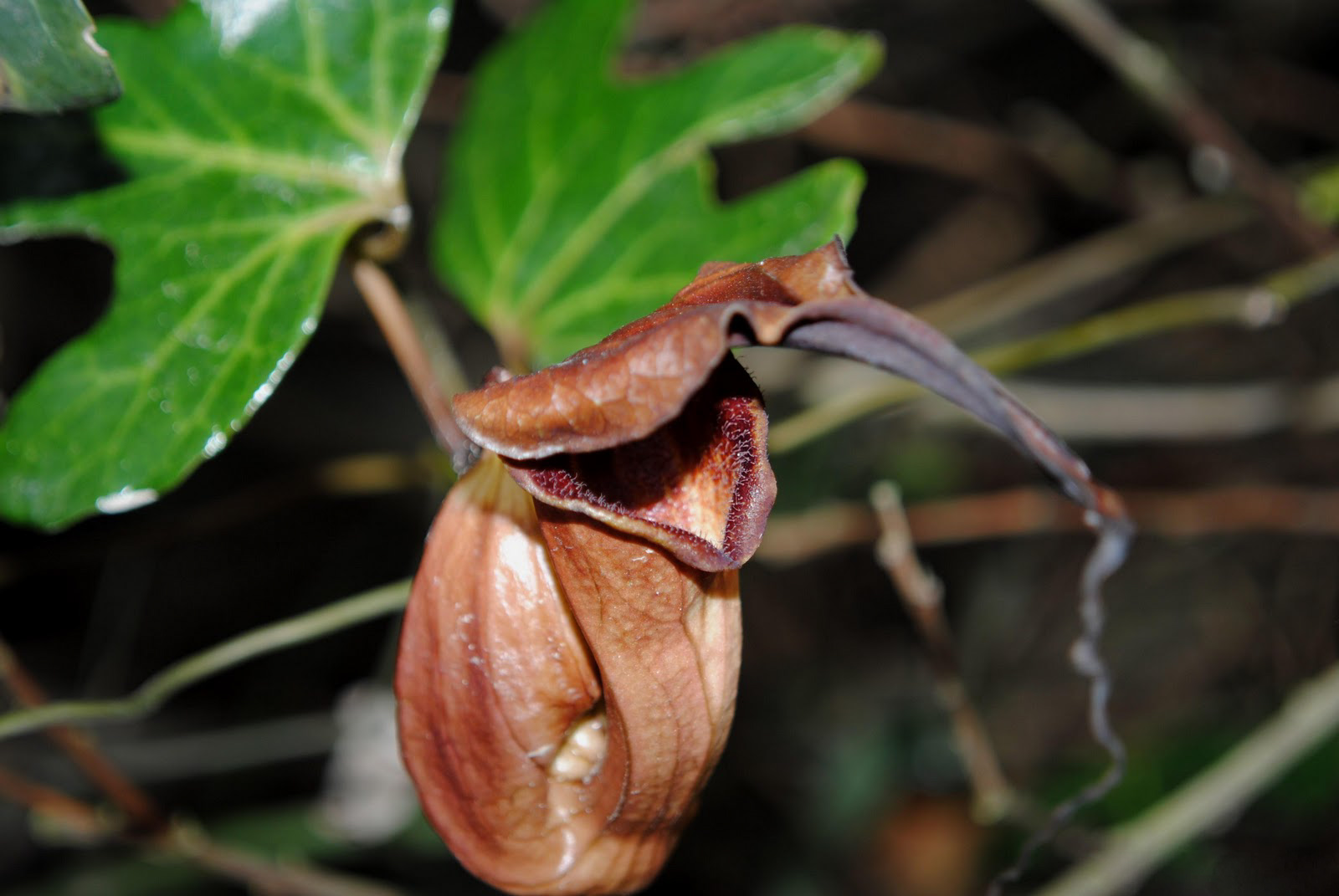 Aristolochia macroura. Aristolochiaceae. Fotos tomadas en la costa platense entre árboles, departamento de Montevideo, Uruguay.